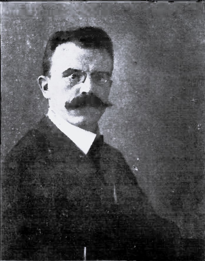 Erich Wallroth – Wirklicher Legationsrat und Vortragender Rat im Auswärtigen Amt.